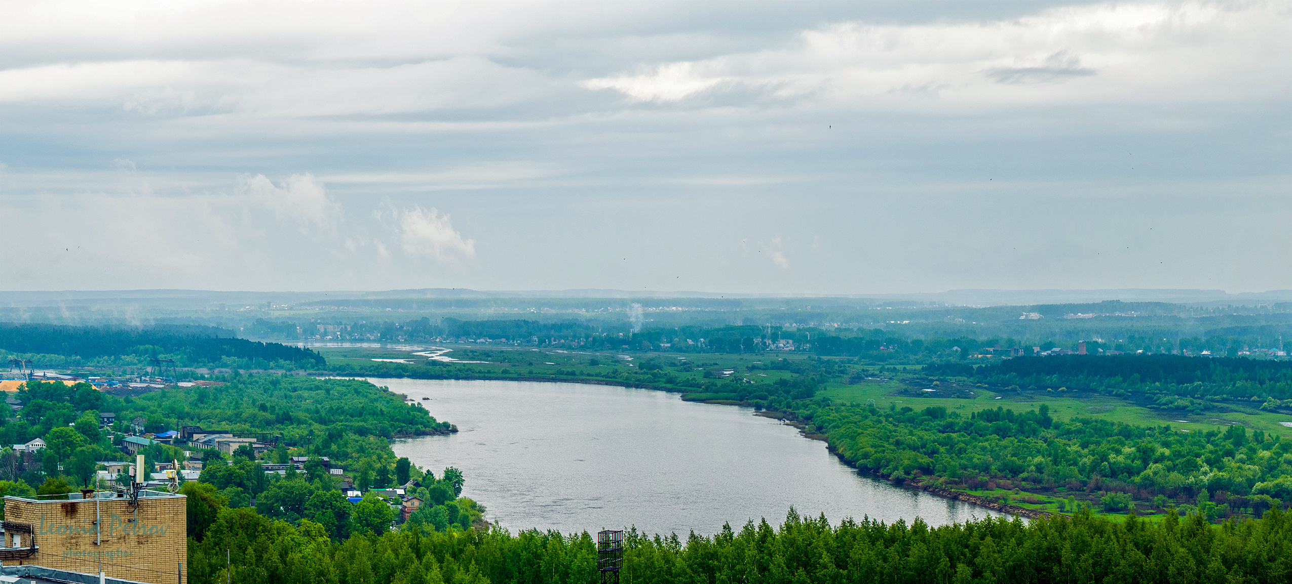 Вид на реку Вятку, протекающую в не большом городке Киров. Вид на нее живописно открывается из многих мест. А именно так ее можно увидеть из окна новых построенных домов буквально на берегу реки. This image is related to the protected area of Russia number 4310060